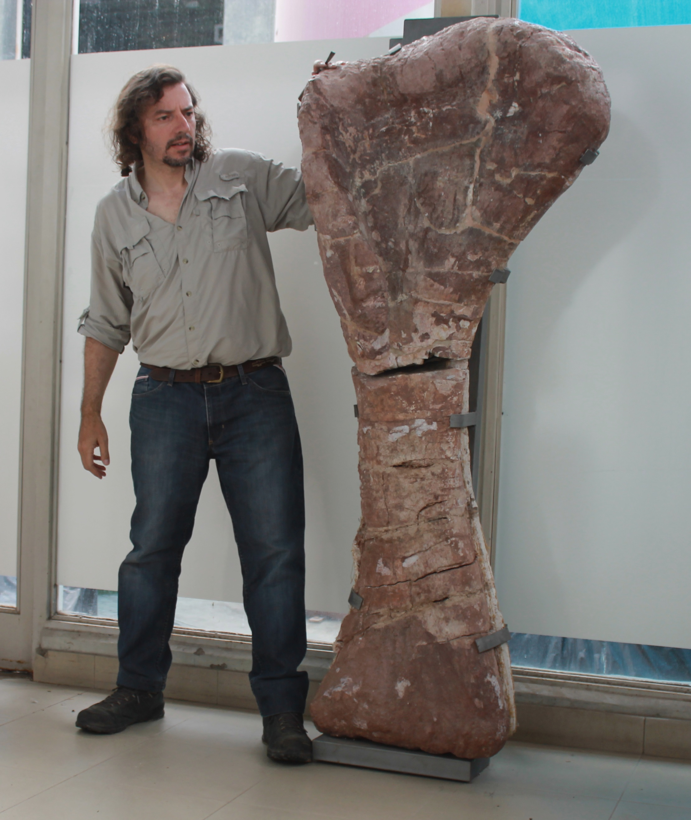 Humero de Notocolossus (1.76m) junto con su descubridor, el paleontologo Bernardo J. Gonzalez Riga.